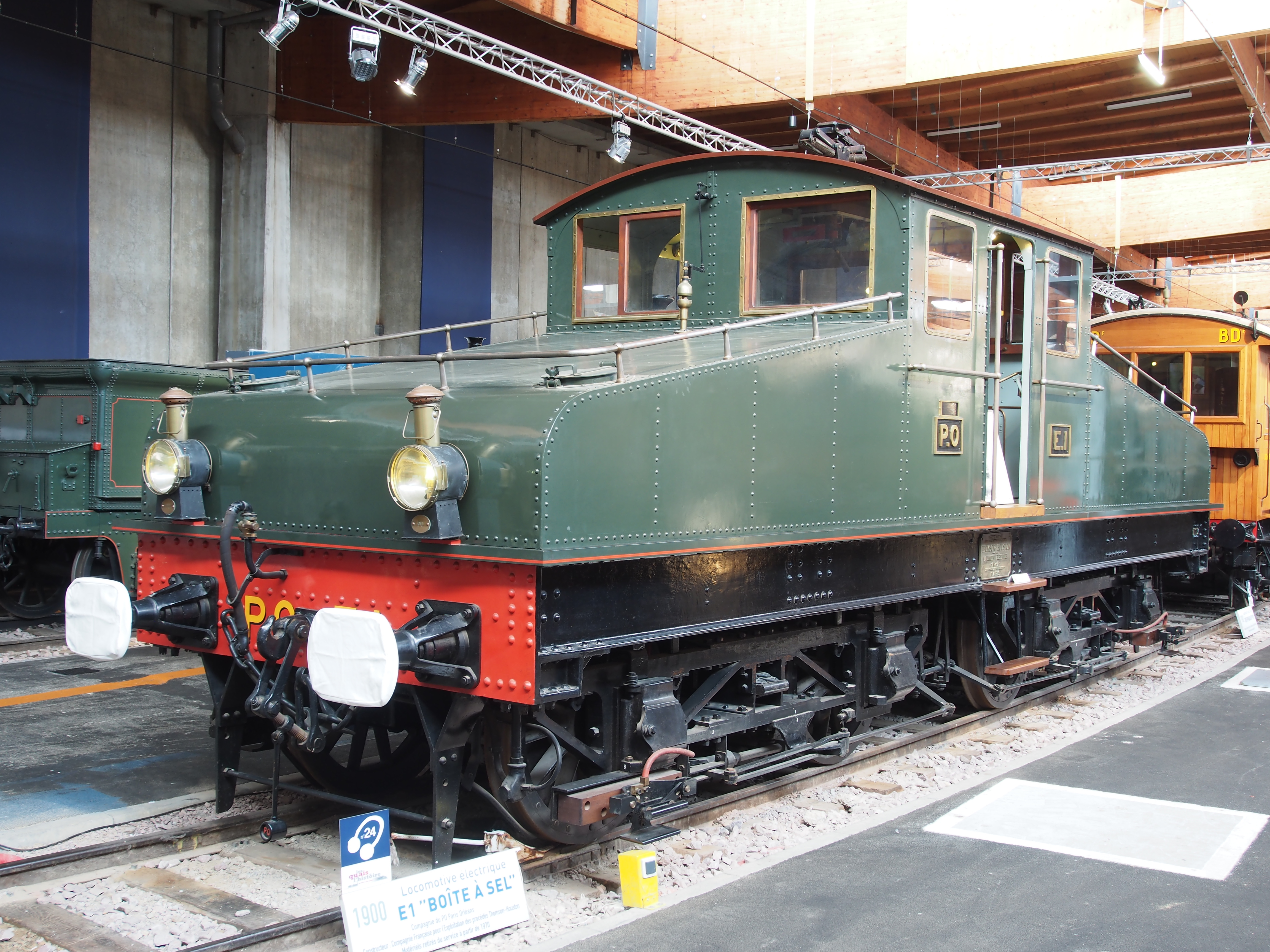 Photographed at Cité du train, Mulhouse, France.